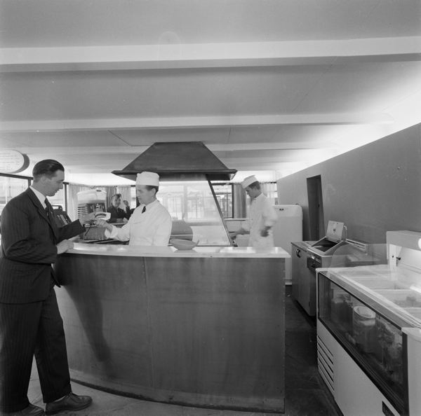 Interiören av Burger-Grill i Helsingborg i juni 1957.